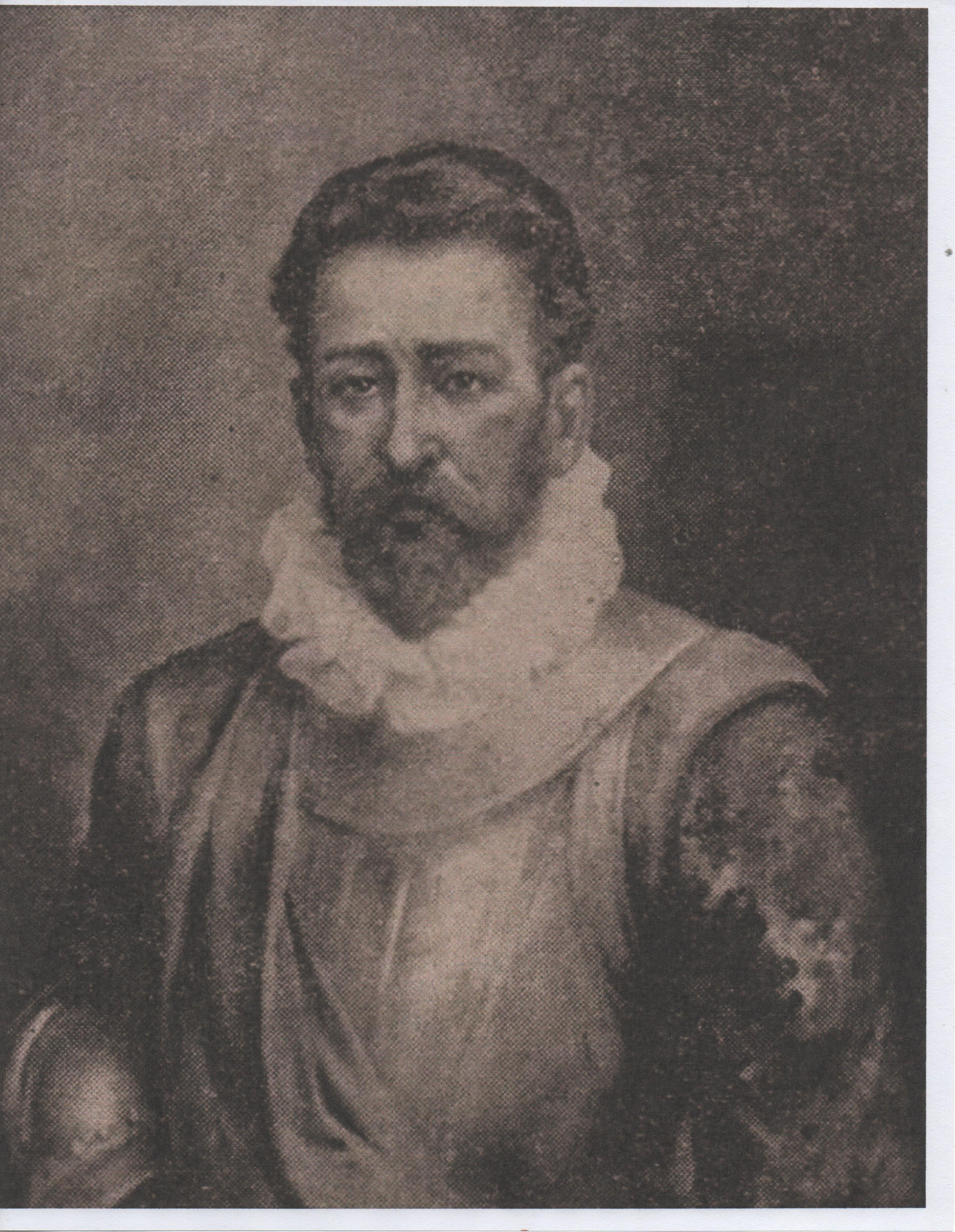 Retrato de Juan Vázquez de Coronado (1523-1565), adelantado y conquistador español, conocido por su papel en la Conquista de Costa Rica. Pintura original de Tomás Povedano de Arcos (1847-1943), pintor español radicado en Costa Rica. La obra original se encuentra en la Casa España, San José de Costa Rica. La fotografía original, también en la Casa España, se tomó en 1934 para una conferencia sobre el personaje, dictada en la Casa España, de fotógrafo desconocido, y apareció en el diario costarricense La Tribuna en 1935. Este archivo ha sido escaneado por mi persona a partir de dicho periódico, que se encuentra en el Archivo Nacional de Costa Rica.